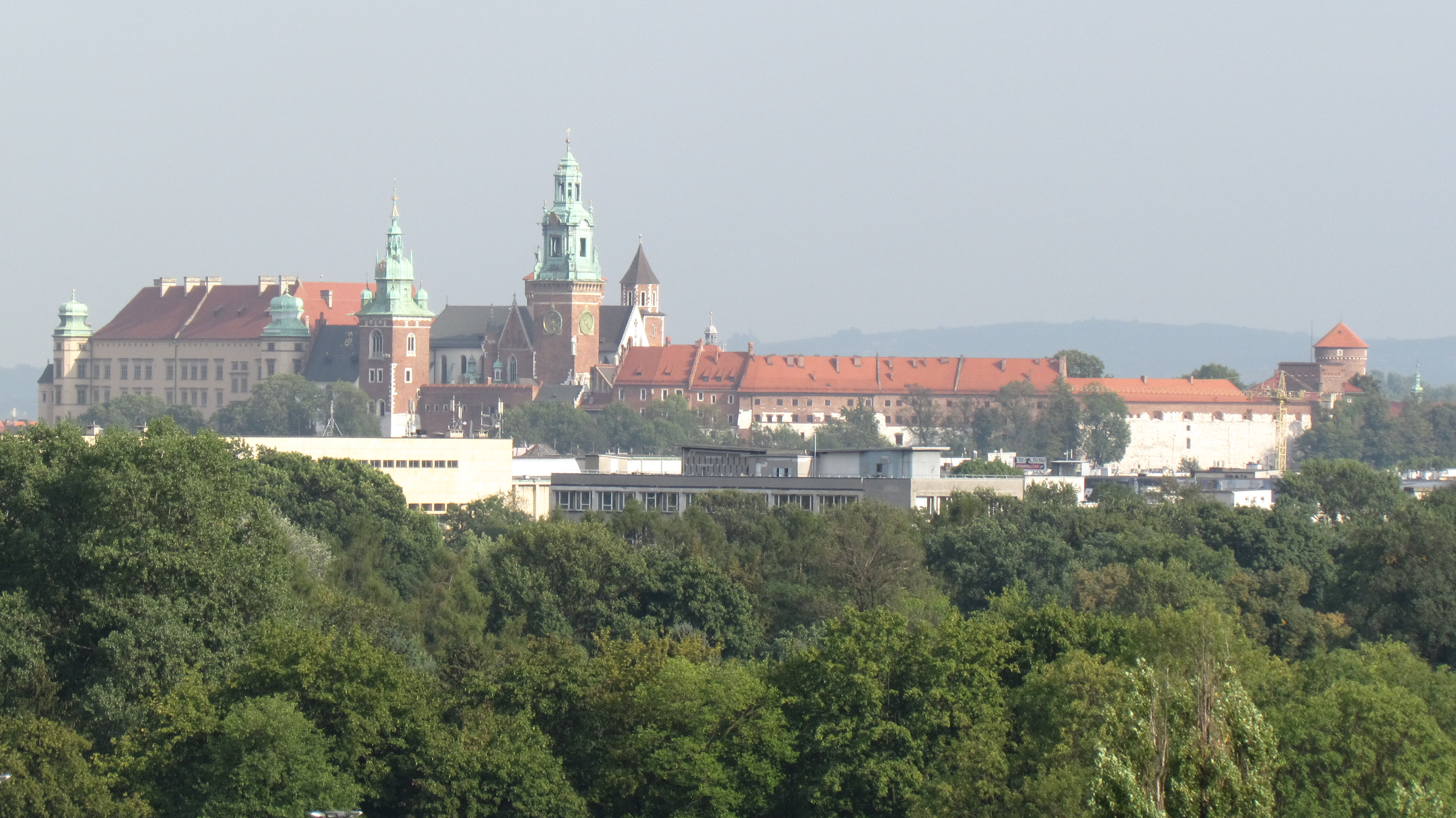 Wawel